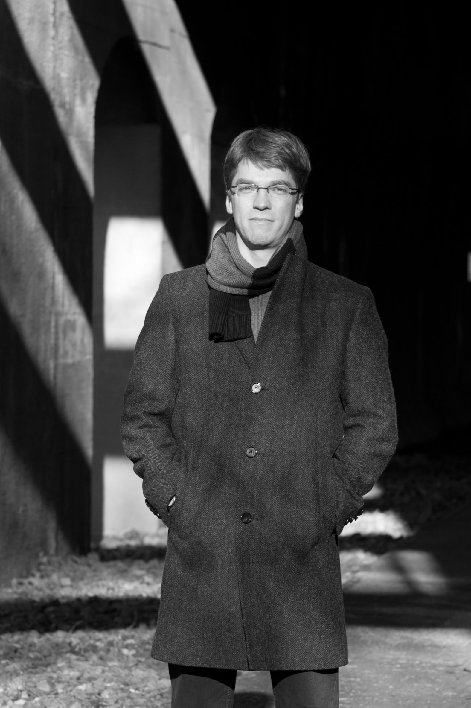 Oliver Korte, fotografiert 2012 von Hartmut Schirmacher